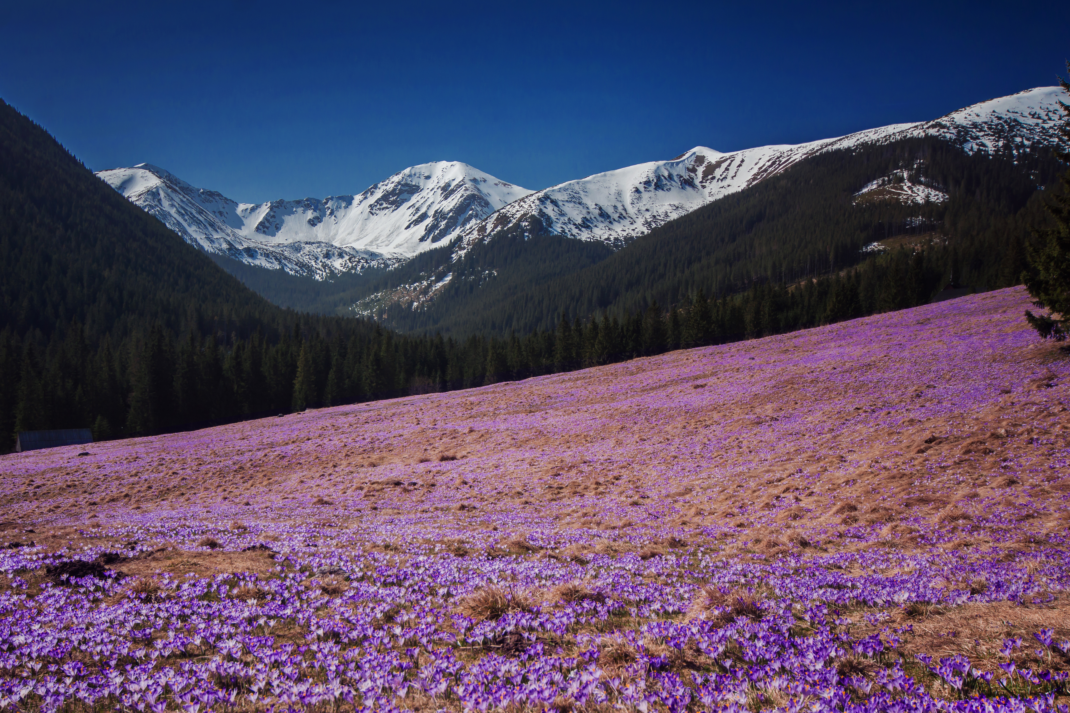 Specjalny obszar ochrony siedlisk: Tatry Krokusy kwitnące na Polanie Chochołowskiej w kwietniu This is a photography of protected area with CRFOP ID PL.ZIPOP.1393.N2K.PLC120001.H